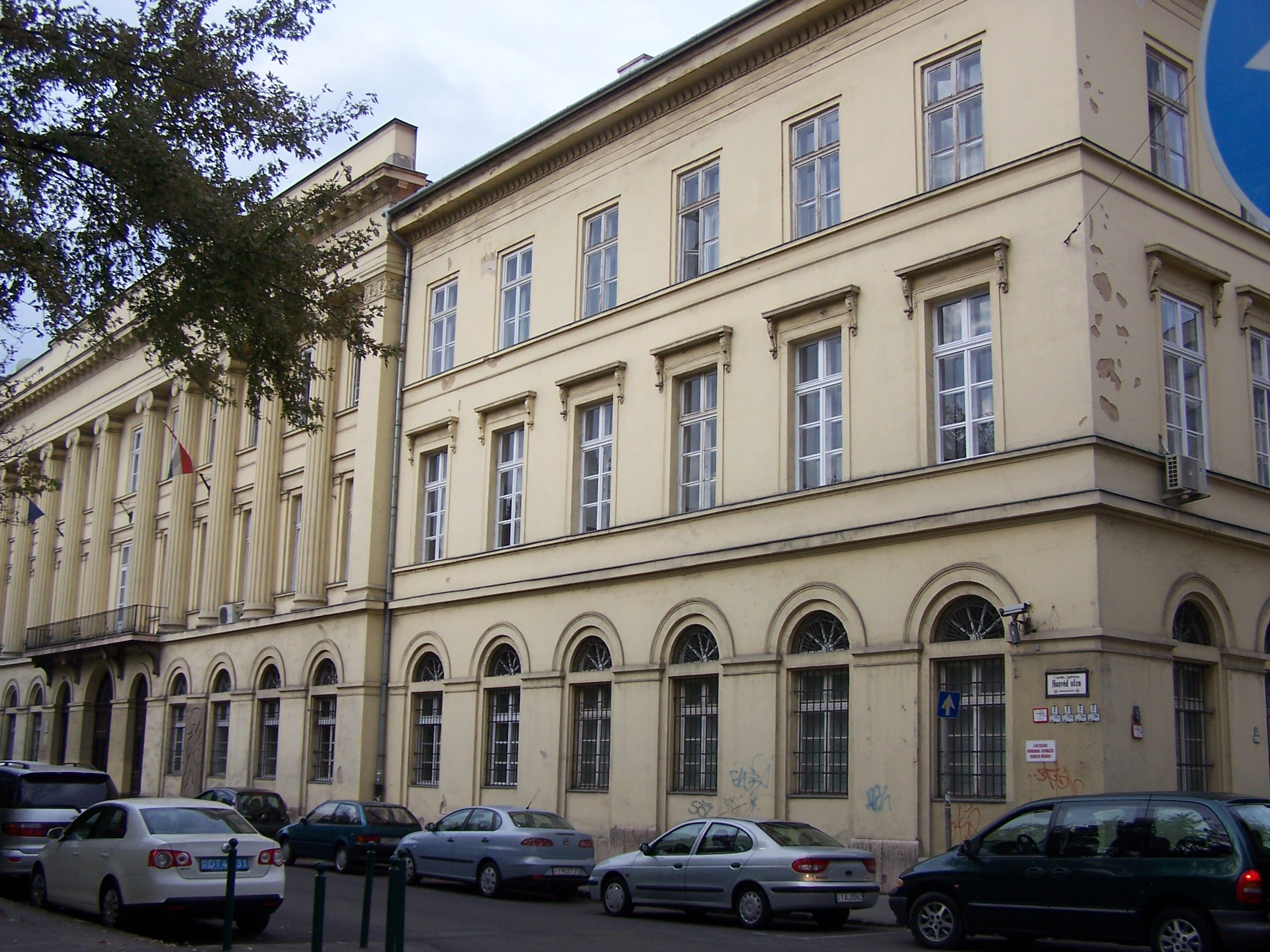 Volt Valero-selyemgyár (Budapest 5, Honvéd utca 24-30., Markó Károly utca 8-12., Stollár Béla utca 7-11., Falk Miksa utca 9.) This is a photo of a monument in Hungary, Identifier: 482